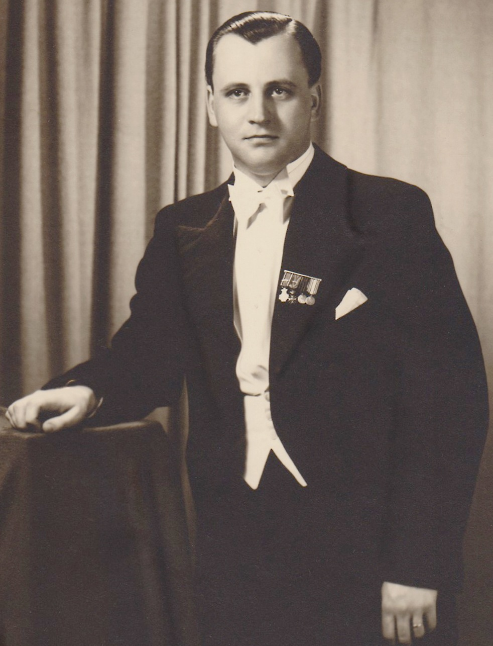 Willy Mommer als Pianist, dekoriert mit der Médaille Militaire avec Palmes, Croix de Guerre 40-45 avec Palmes, Médaille de la Résistance, Médaille commémorative 40-45 (v.l.n.r.)